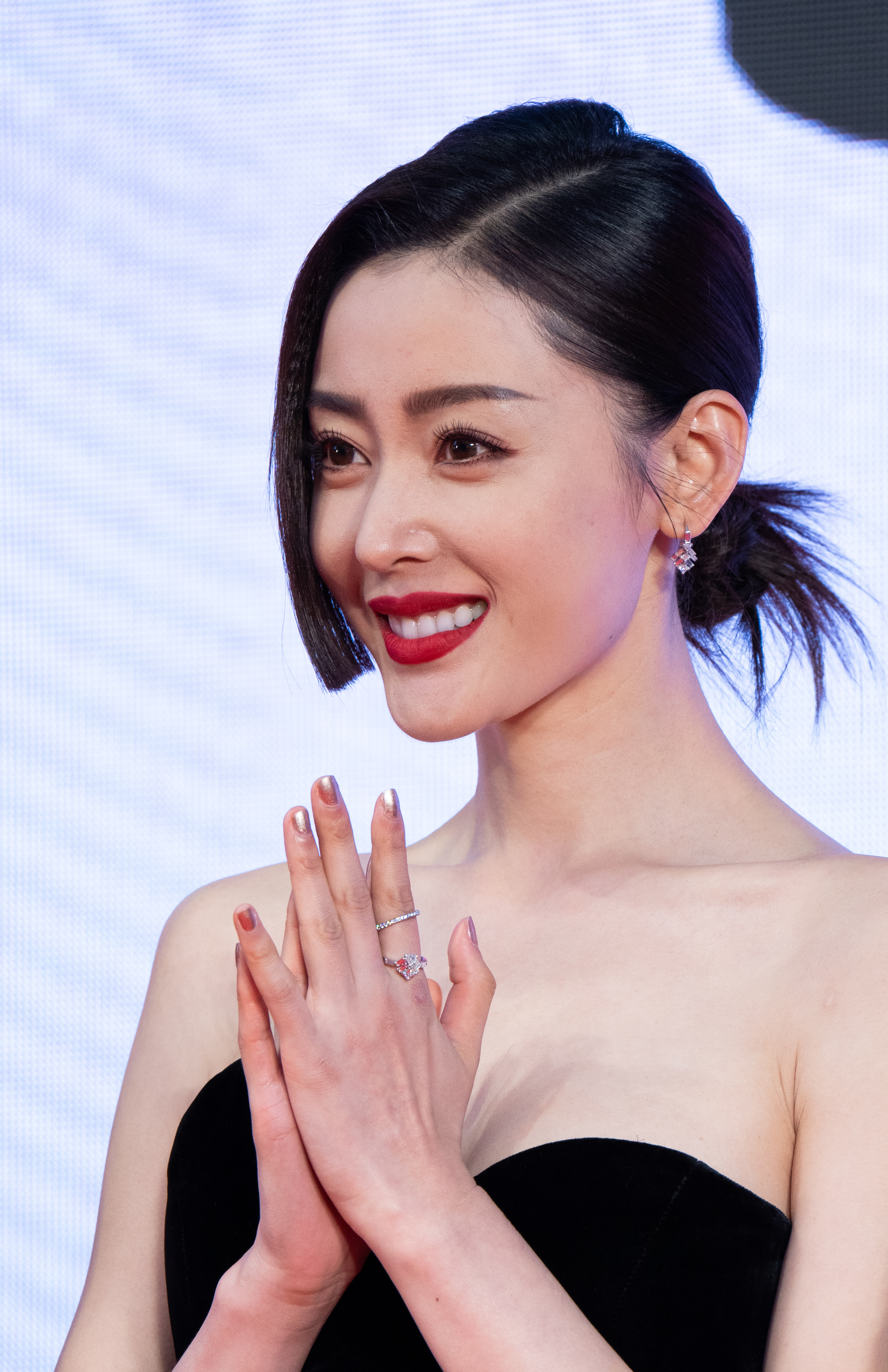 第32回 東京国際映画祭 オープニングセレモニー 張天愛 (2019東京・中国映画週間)